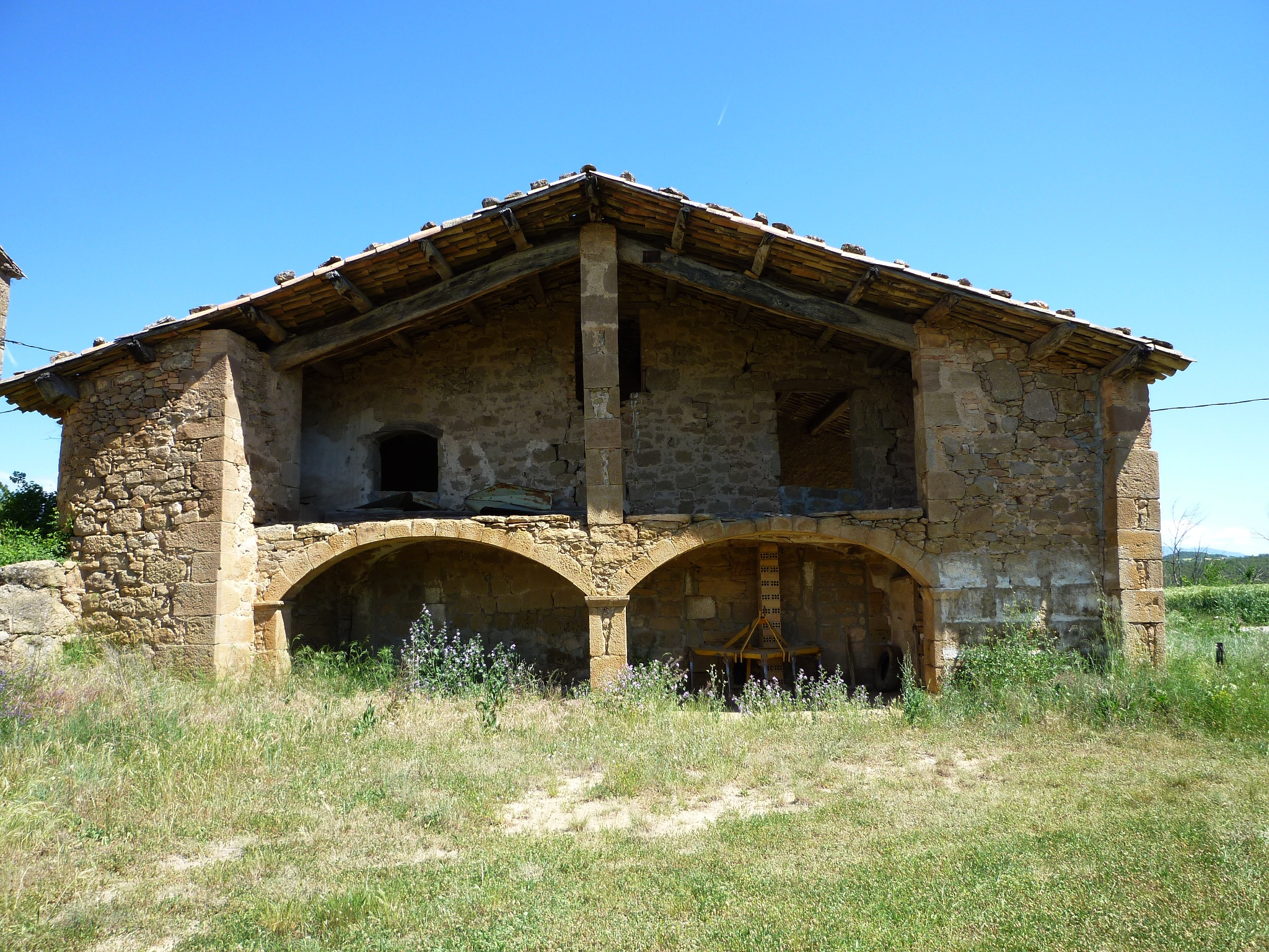 Casanova de Pinell (Pinell de Solsonès): la pallera